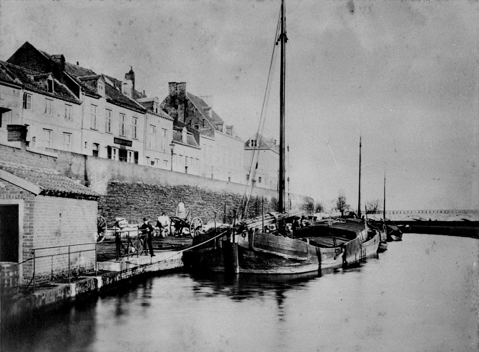 Poorten, Diversen: oude walmuur, links Onze Lieve Vrouwepoort